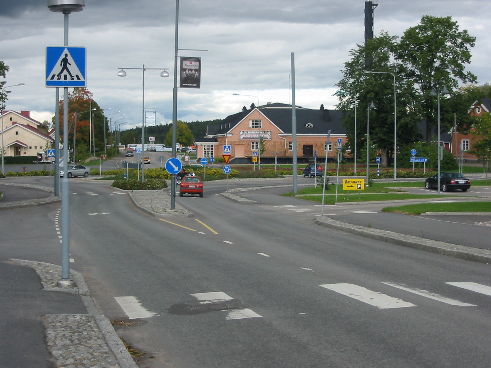 Ruunalan risteys Somerolla muodostaa Someron keskustaajaman pääkadun Joensuuntien ja yhdystien 2810 risteyksen. Aiemmin se on ollut valteiden 2 ja 10 risteys.